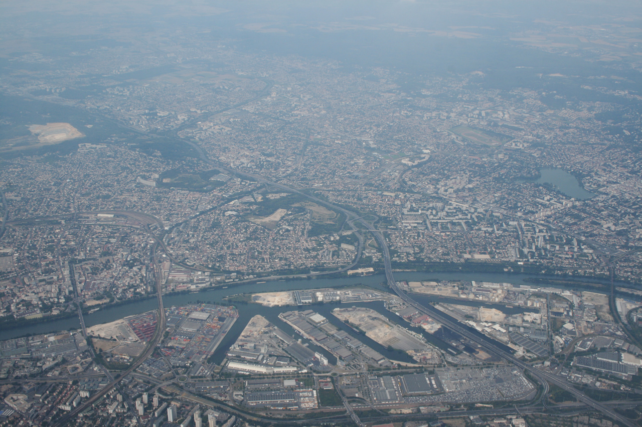 Port de Gennevilliers vue d'avion